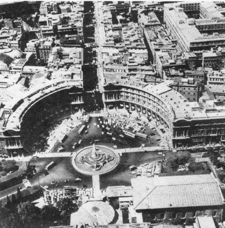 Foto di Piazza della Repubblica a Roma dopo il 1870, anno di inaugurazione di via Nazionale.